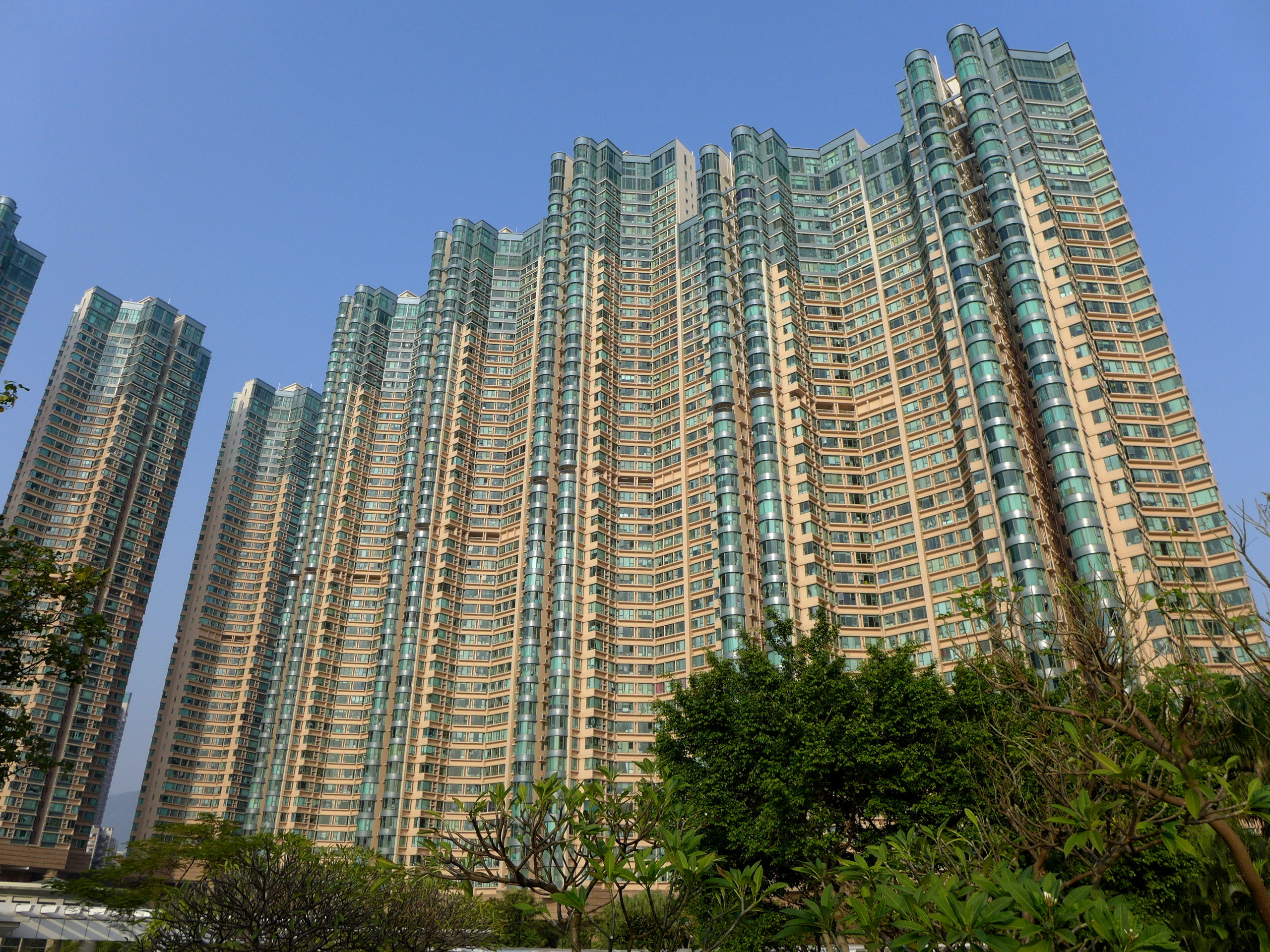 Park Avenue 柏景灣